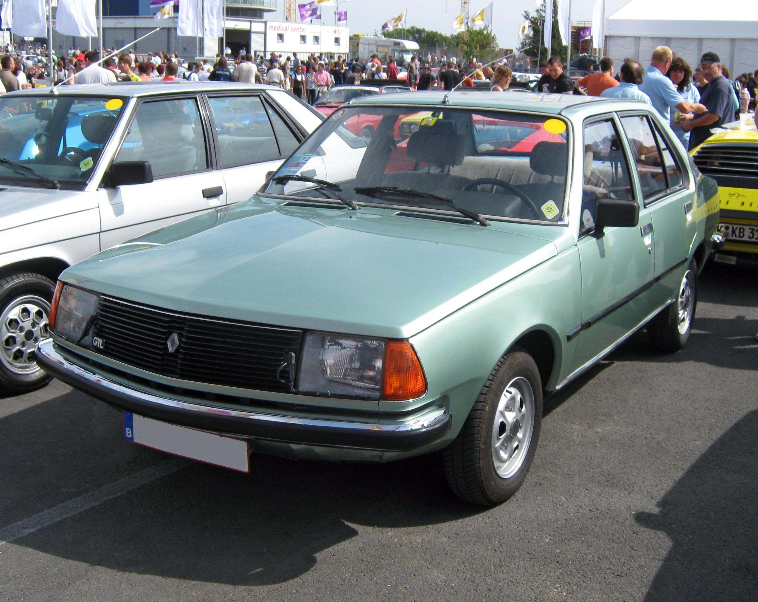 Renault 18 Limousine der ersten Serie (orangefarbene Blinkergläser, Chrom-Stosstangen und -Türgriffe) Frontansicht